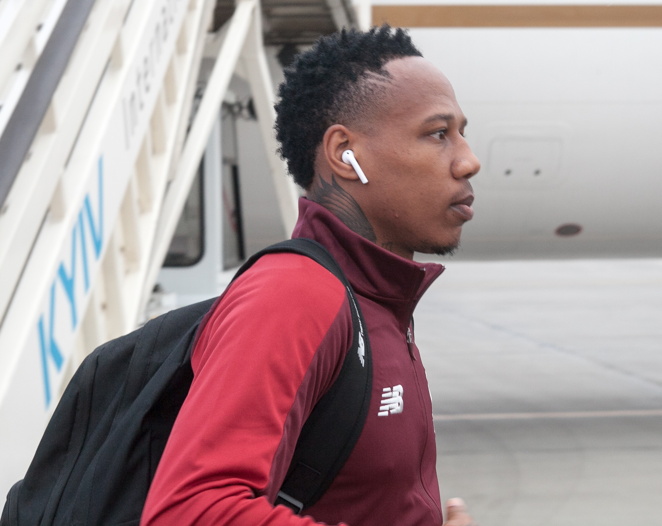 Команда ФК «Ливерпуль» прибыла в Киев, 2018